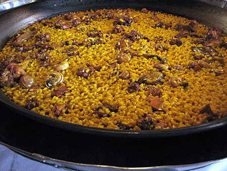 Reispfanne mit Kaninchen und Weinbergschnecken